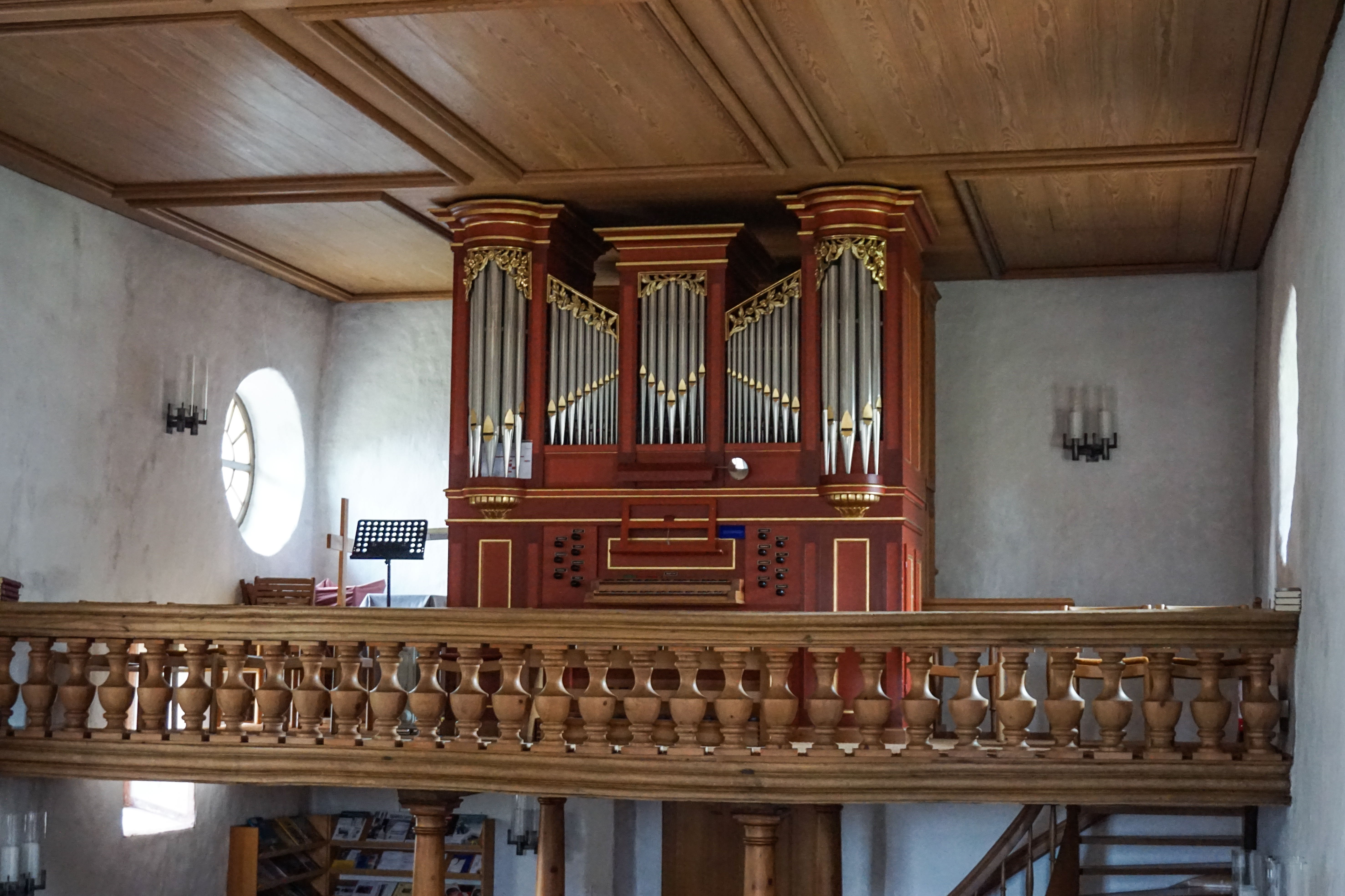 Empore mit Orgel. Im Gehäuse des J. Weber von 1821 Neubau von Metzler